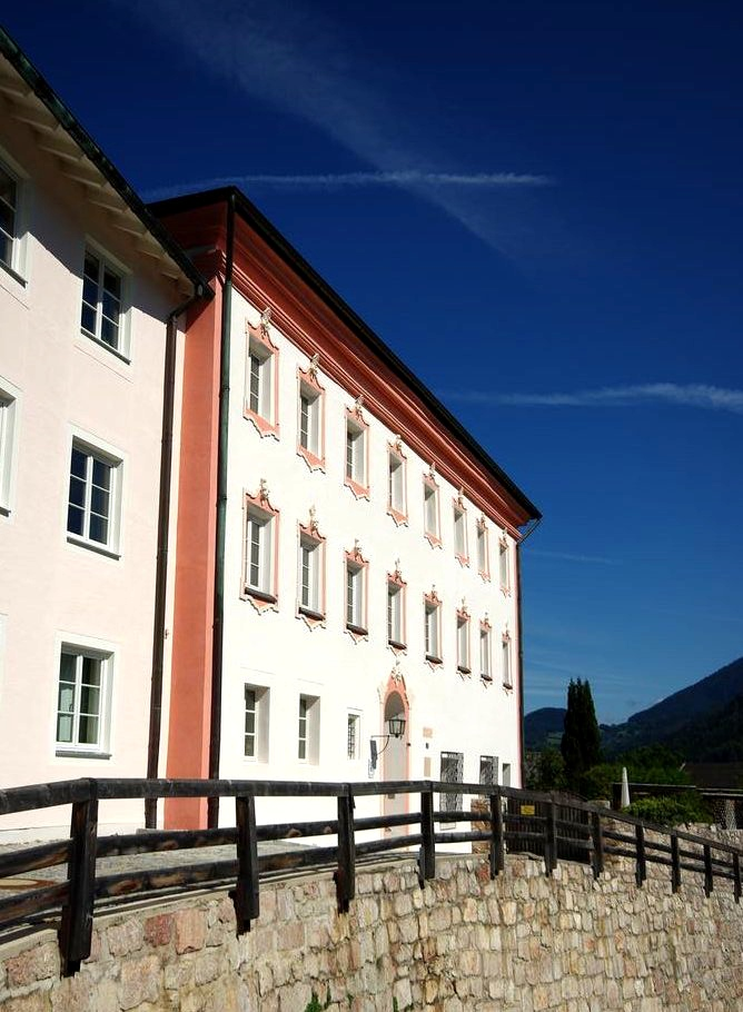 Doktorberg 4, BerchtesgadenThis is a photograph of an architectural monument.